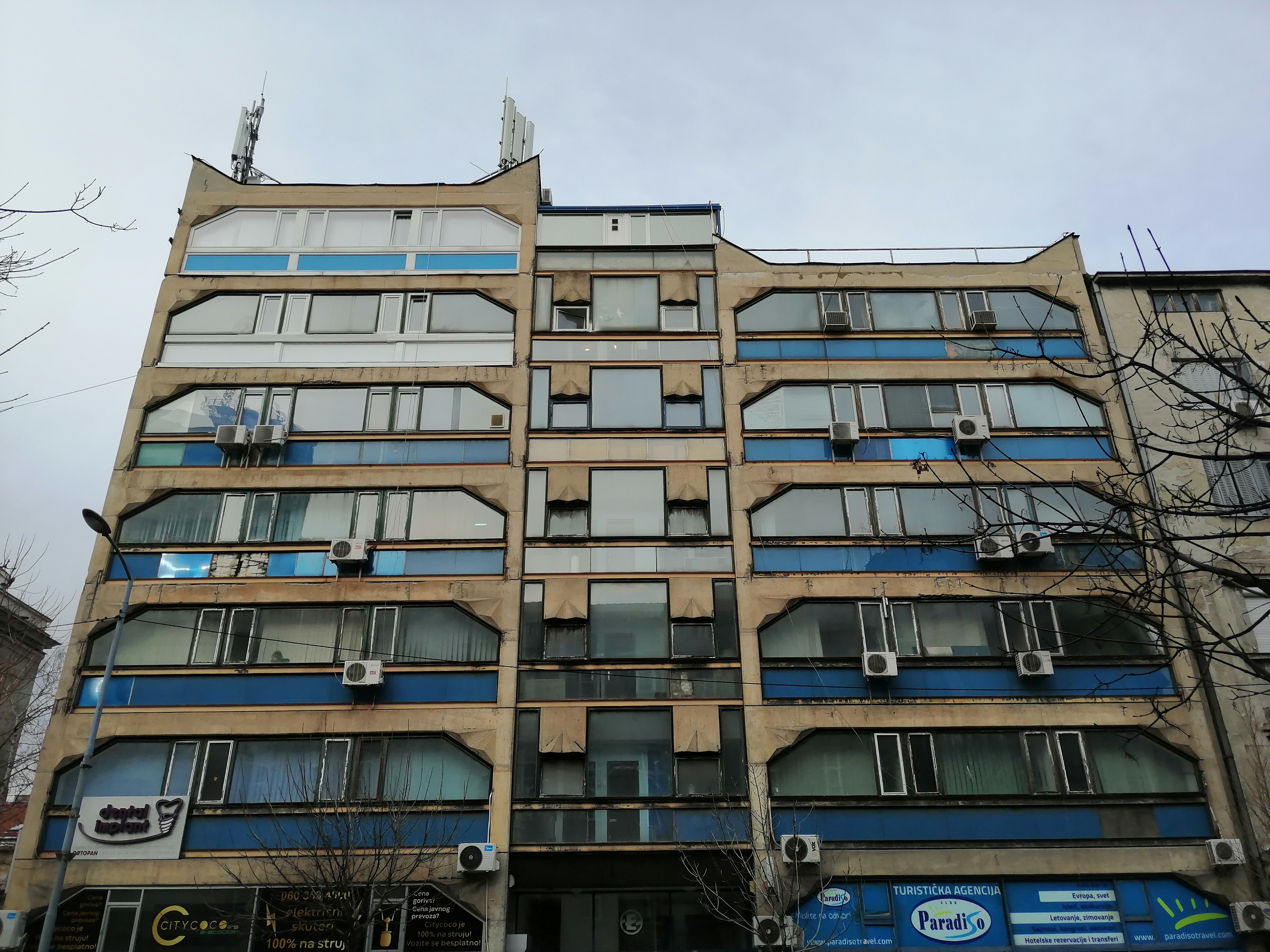 Srpski (latinica): Zgrada u Bulevaru Despota Stefana 15